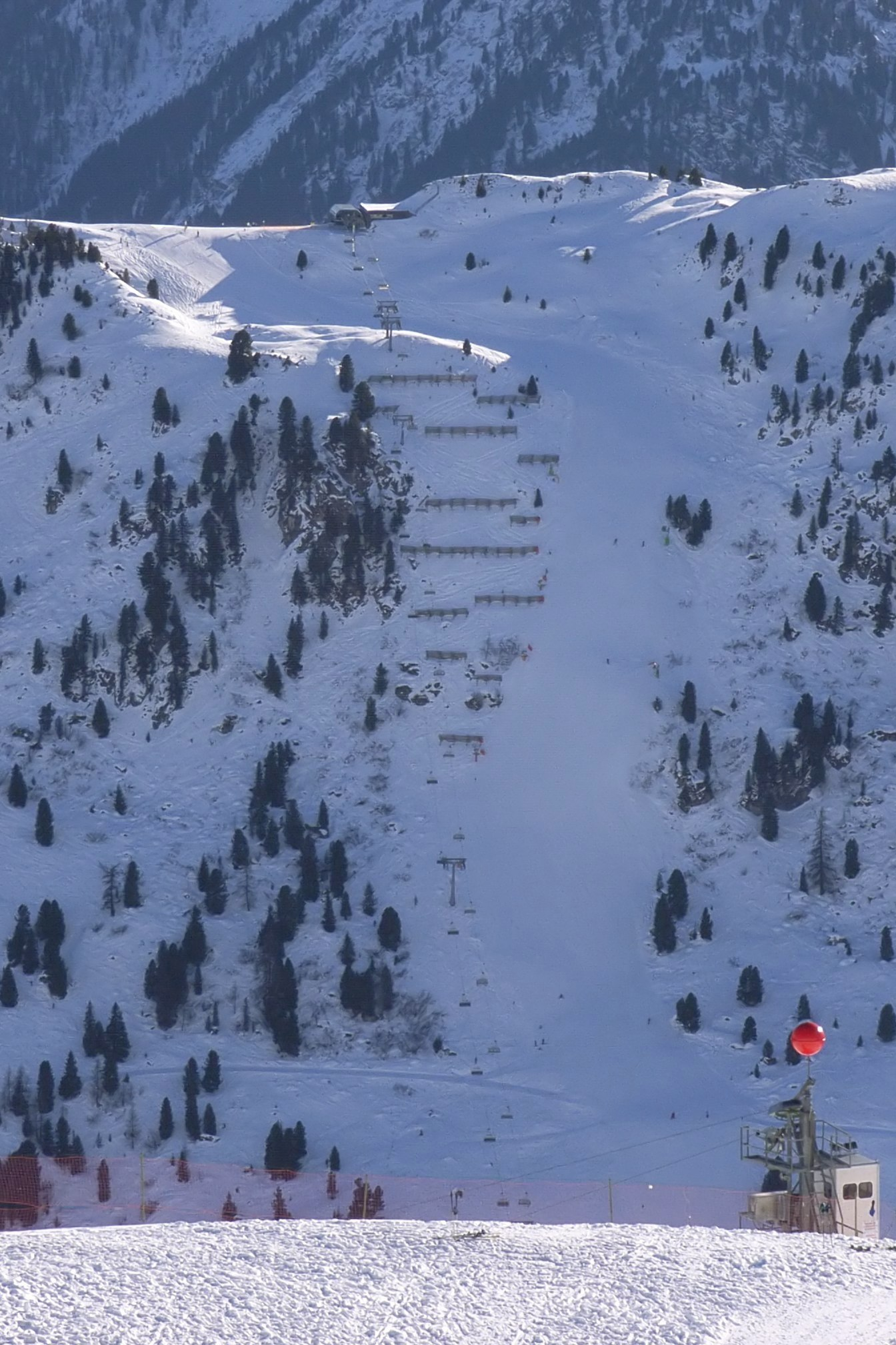 Harakiri-Skipiste; Standort: Bergstation Horberg-Lifte